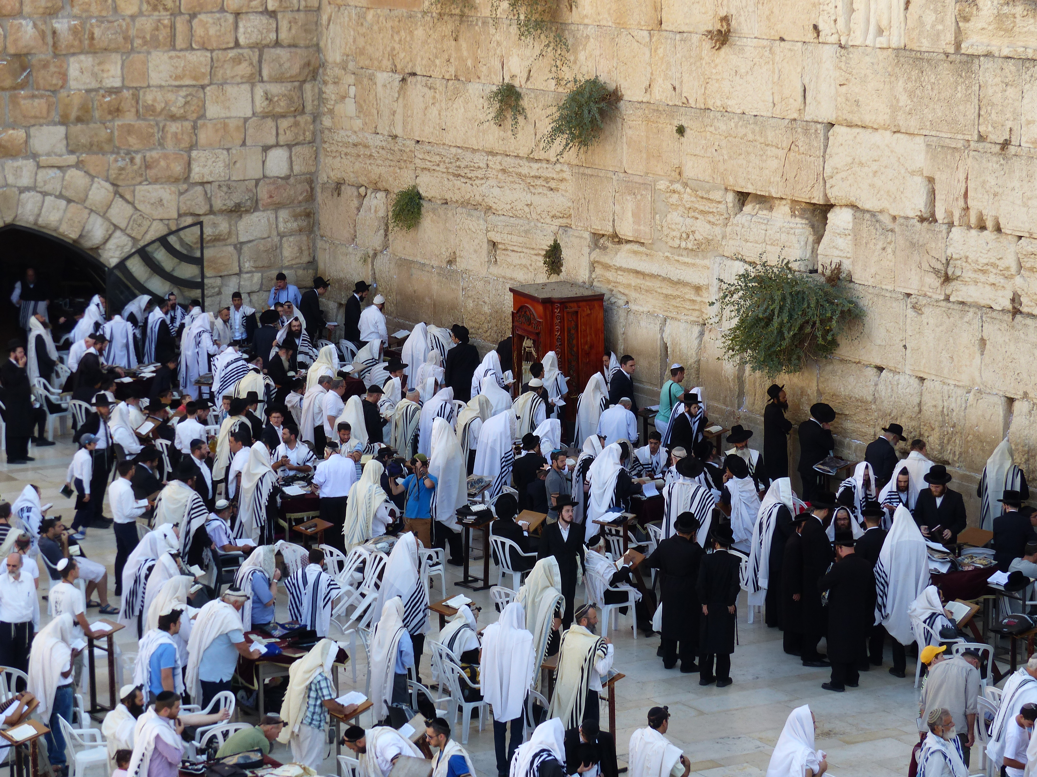 Fieles en el Muro de las Lamentaciones, Jerusalén